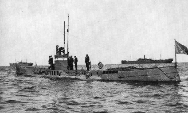 Sous-marin russe Okun de classe Kasatka. Photo prise avant 1917. Image scannée à partir du livre "Submarines of the Tsarist Navy : A pictorial History". Pour plus d'informations sur la licence de l'image, voir Discussion Utilisateur:Alonso/Images Sous-marins. Source I.D. Spassky, V.P. Semyonov & Norman Polmar, Submarines of the Tsarist Navy : A pictorial History, Naval institute Press, États-Unis, 1998 (ISBN 1-55750-771-6)